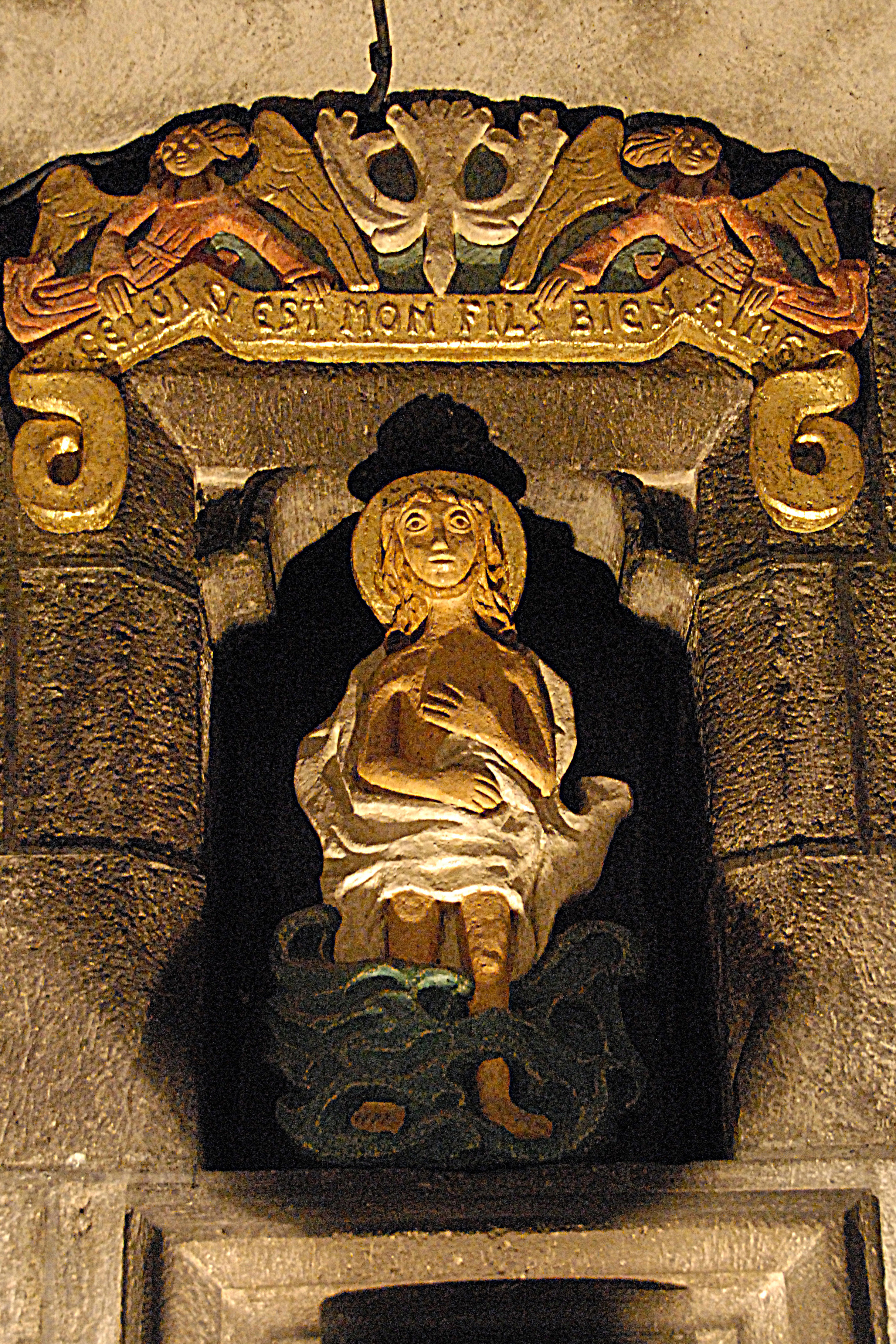 N.-Dame d'Orcival, Taufe Jesu im Jordan